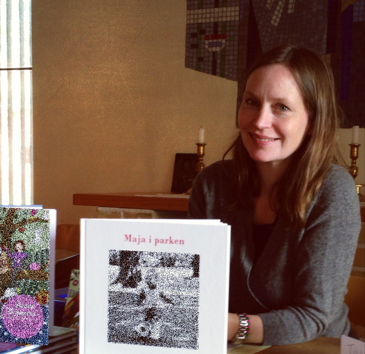 Författaren Emma Fäldt, 2014.